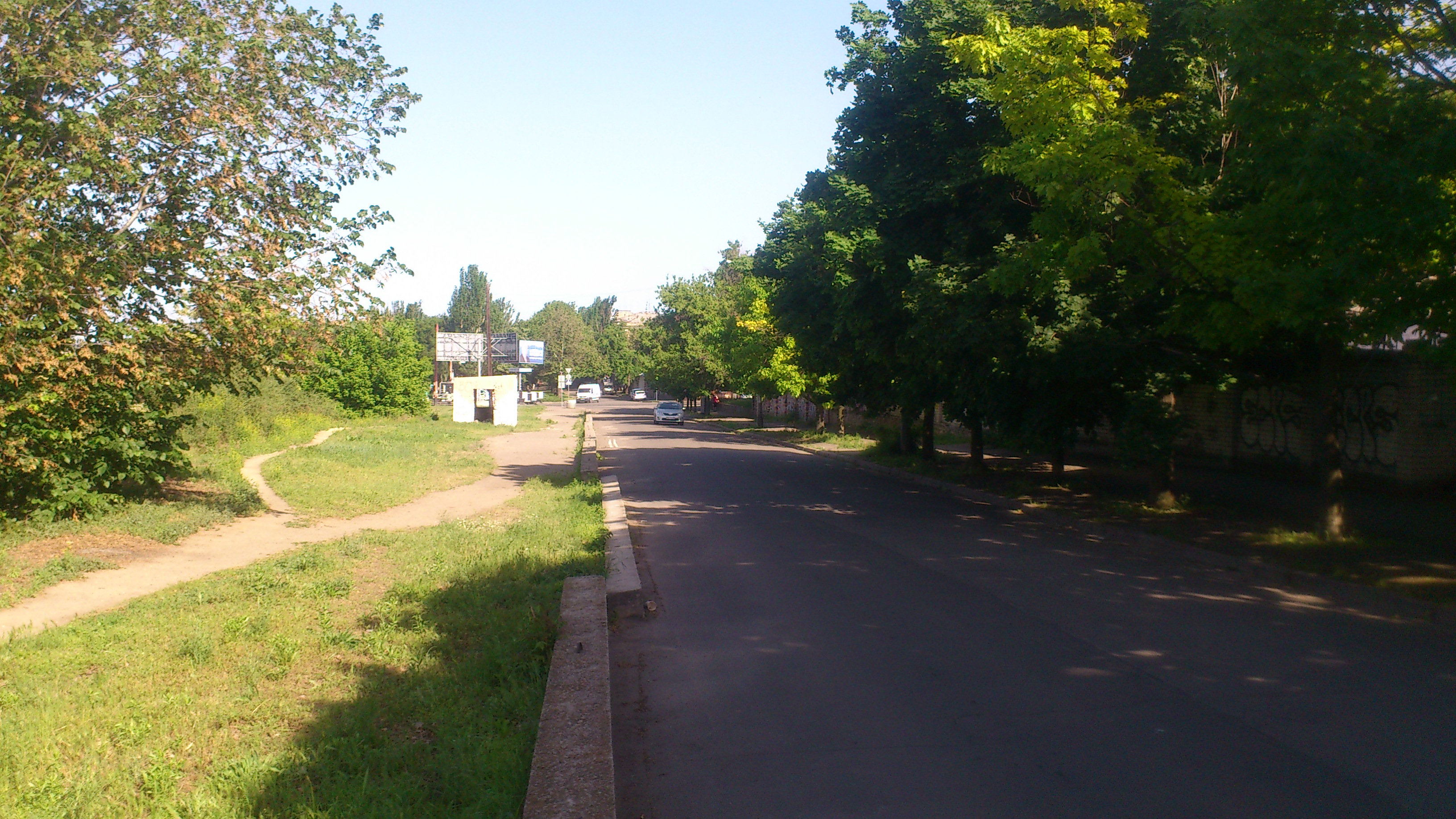 Миколаїв. Вулиця Набережна